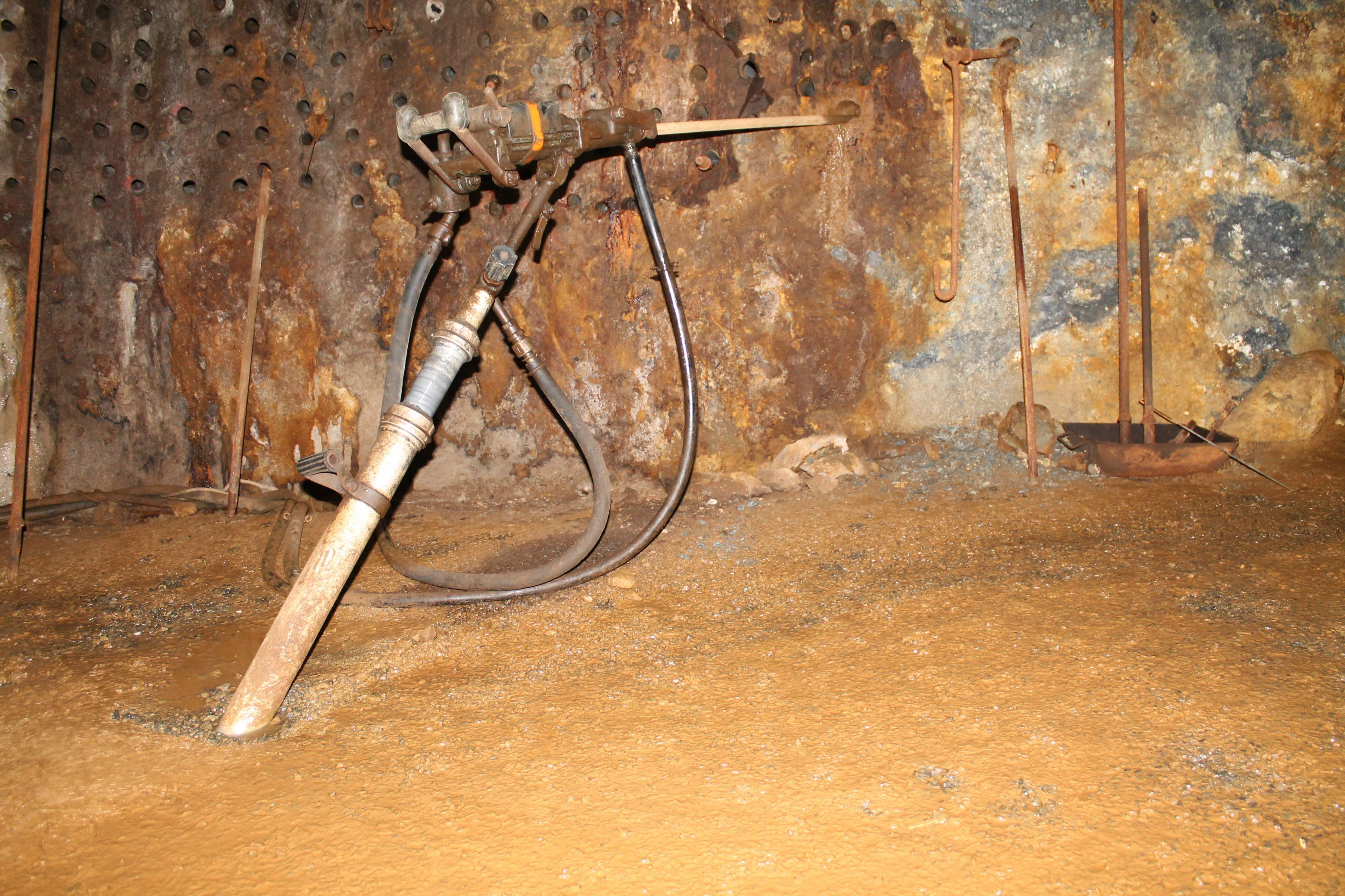 Bohrhammer 2